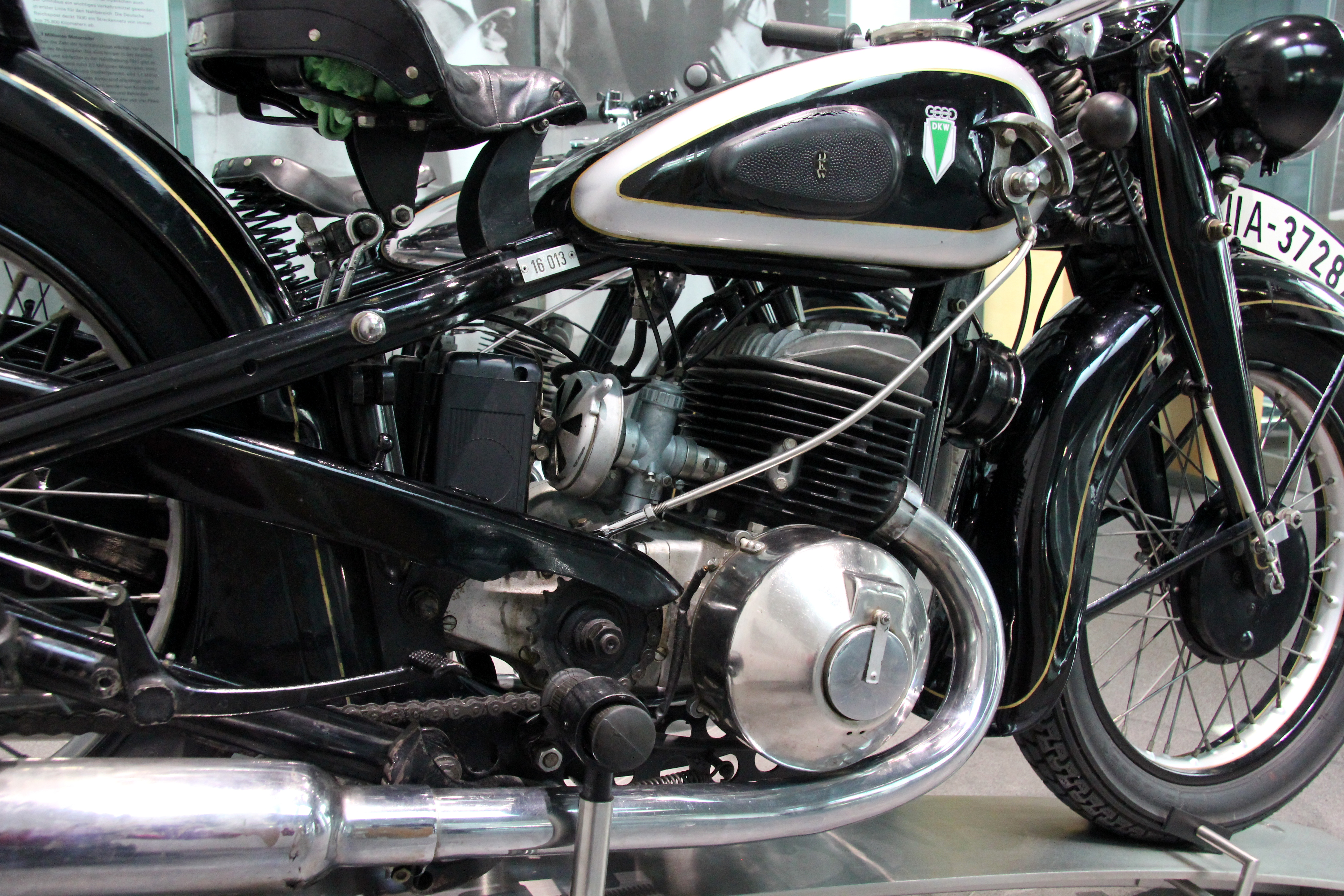 Detail einer DKW SB 500, 2. Serie, Baujahr 1936, im museum mobile in Ingolstadt. Zweizylinder-Zweitaktmotor, 494 cm³, 15 PS bei 4000/min, Höchstgeschwindigkeit 115 km/h; Preis 995,00 RM, 13.300 Stück von 1936 bis 1939 gebaut. Im September 1938 wurde eine Sonderanfertigung mit vergoldetem Tank an den König des Irak ausgeliefert.